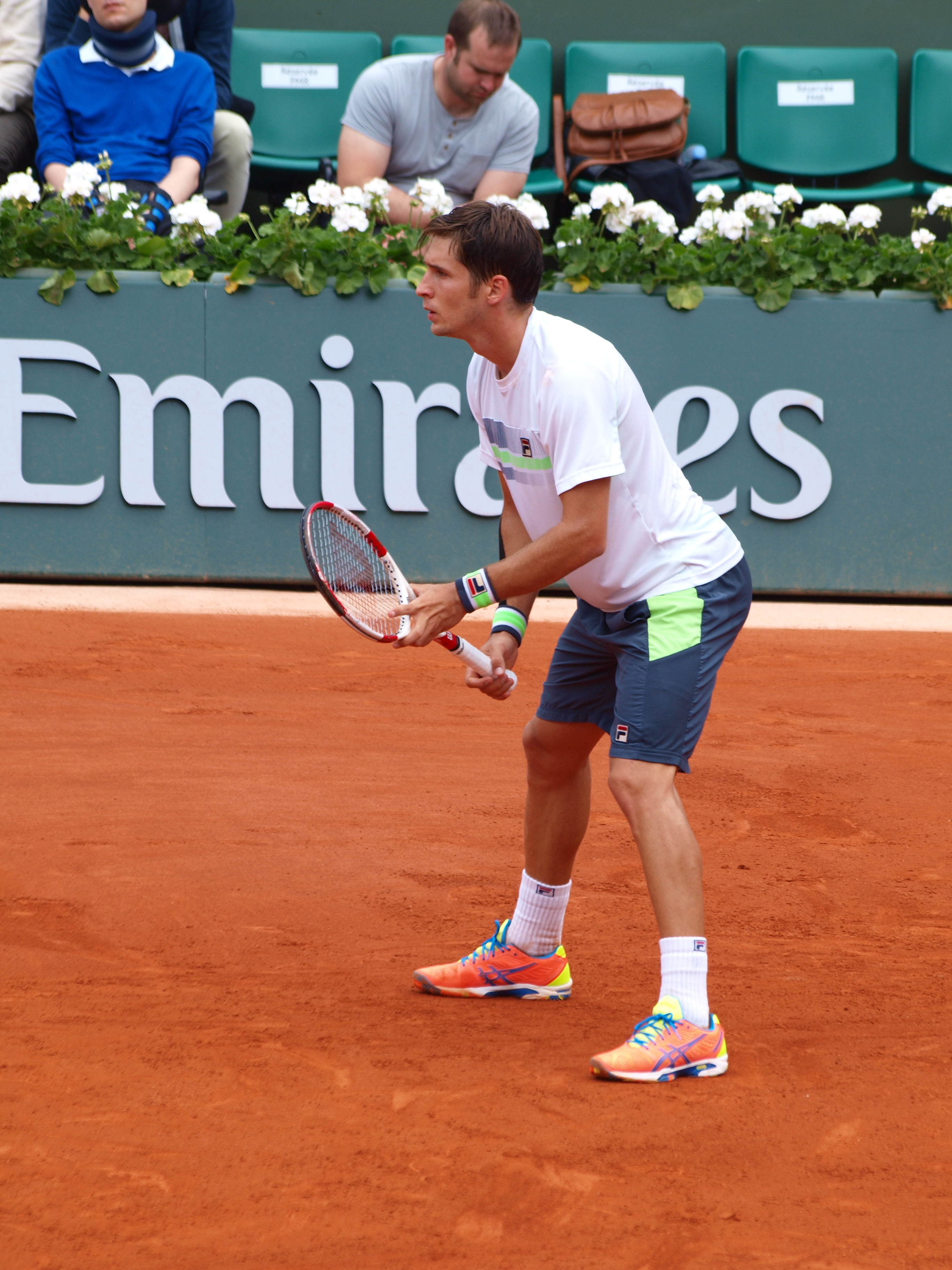 Internationaux de France de tennis, le 2 juin 2014, sur le court Philippe Chatrier : Dušan Lajović